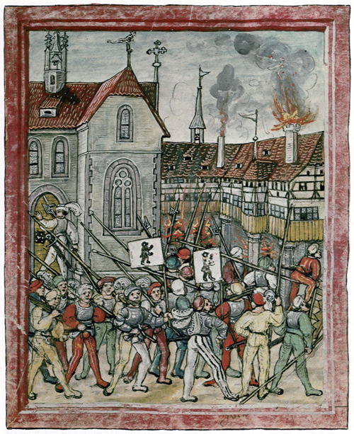 Überfall der Stadt St. Gallen und Appenzells auf das Kloster Mariaberg bei Rorschach 1489 (Rorschacher Klosterbruch)